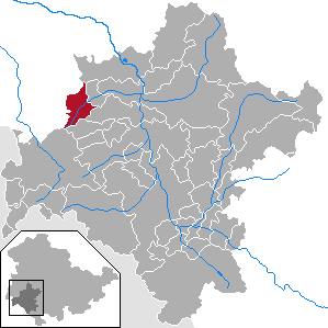 Roßdorf in Thuringia - District Schmalkalden-Meiningen